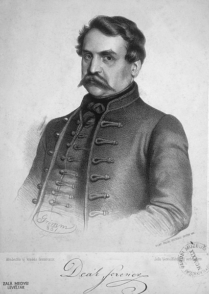 Deák Ferenc 1861-ben (litográfia)